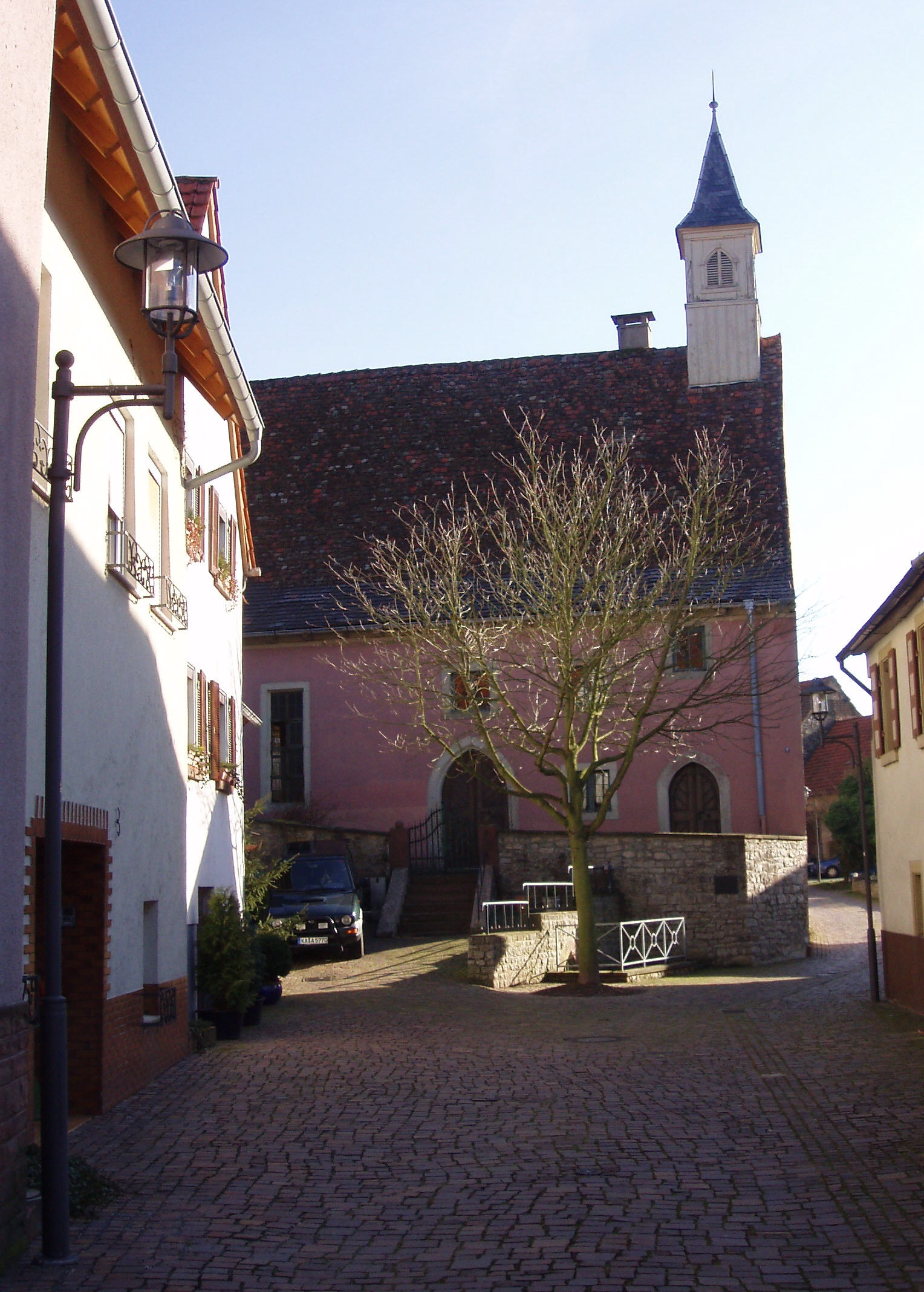 Schloss- oder Burgkapelle in Obergrombach. Einst katholische Kirche, dann Synagoge, dann evangelische Kirche.